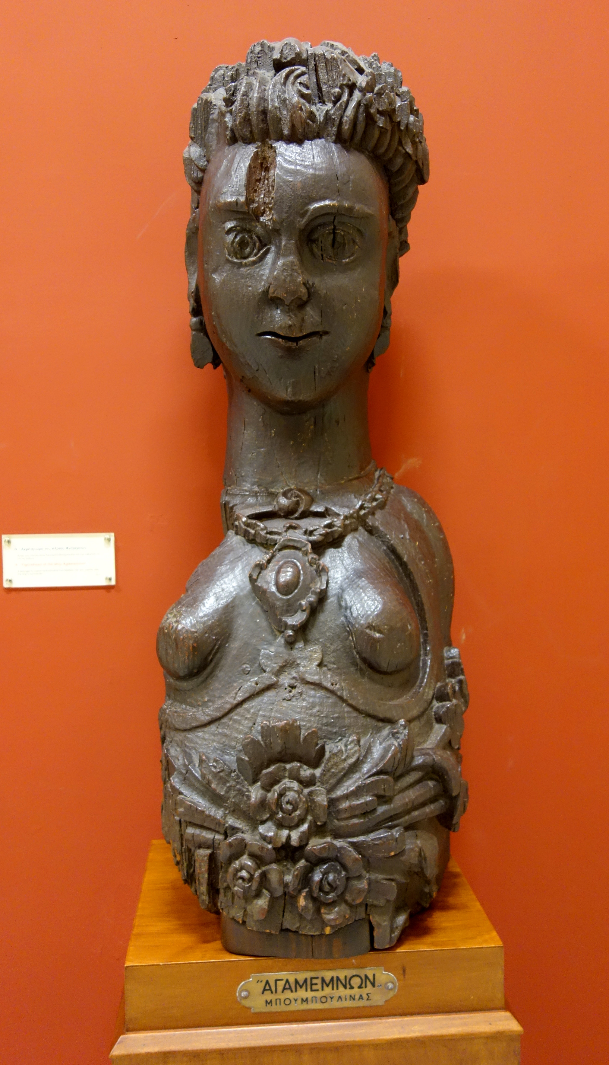 Mvskoke: Το ακρόπρωρο του πλοίου Αγαμέμνων της Λασκαρίνας Μπουμπουλίνας με κυβερνήτη το γιος της Ιωάννη.